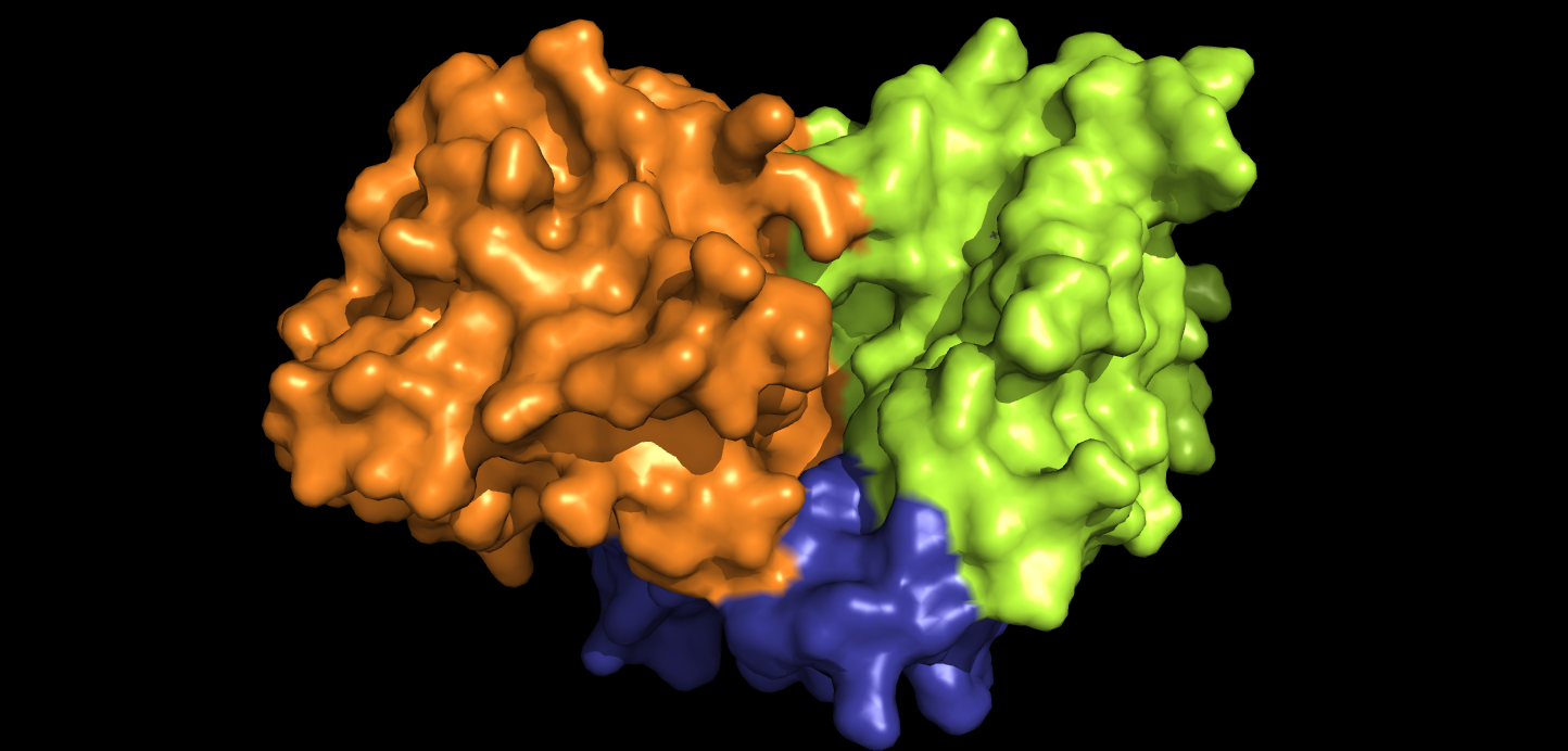 Estrutura da NDH-2 colorida por domínios